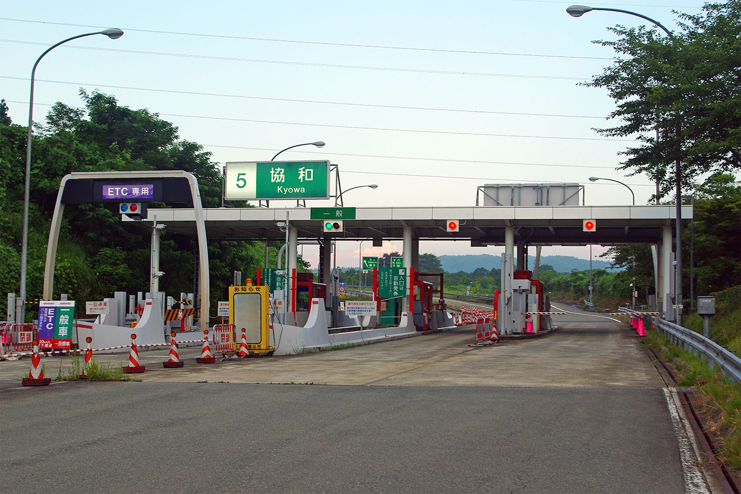 秋田自動車道 協和インターチェンジ